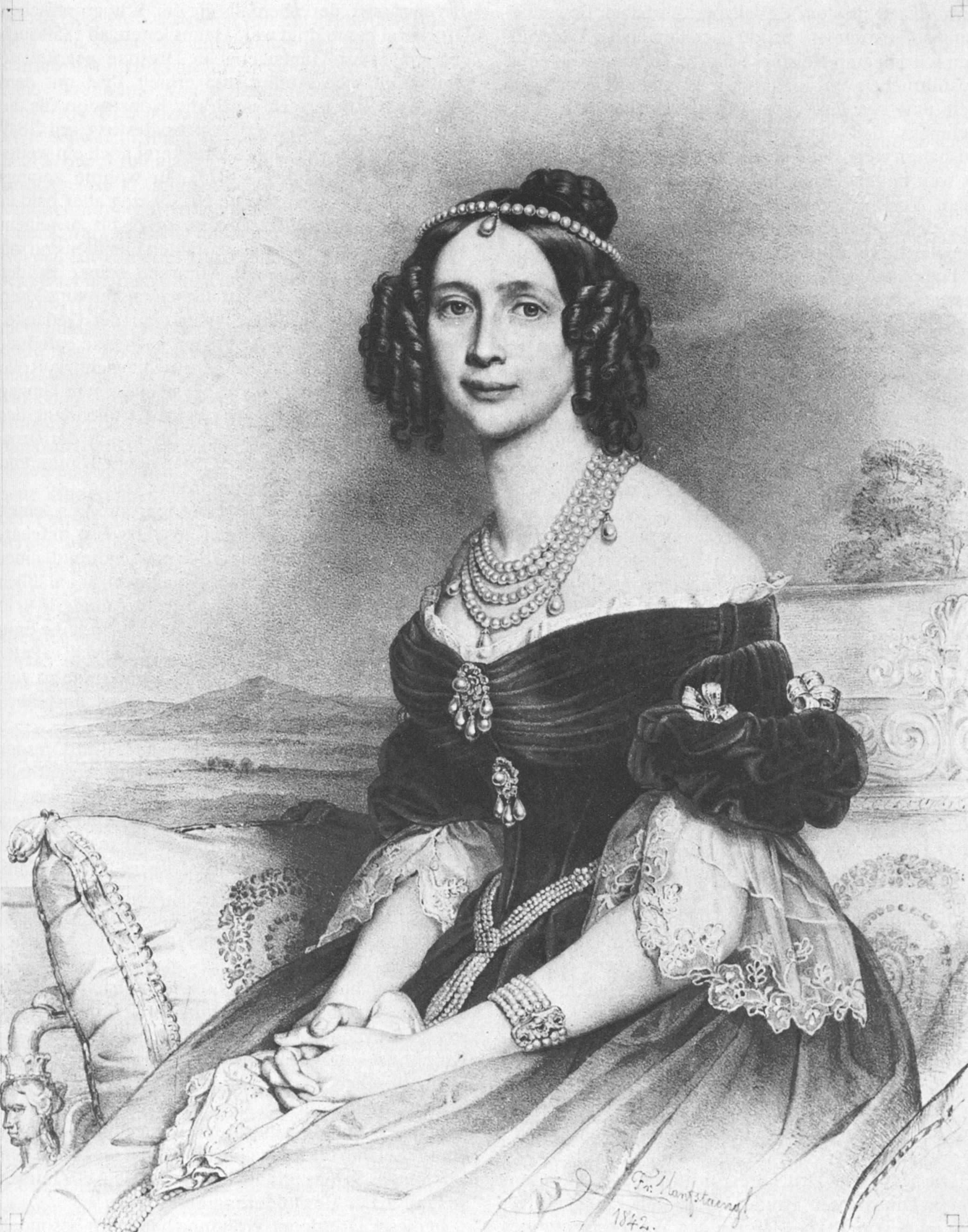 Marie, Königin von Sachsen (1805-1877)